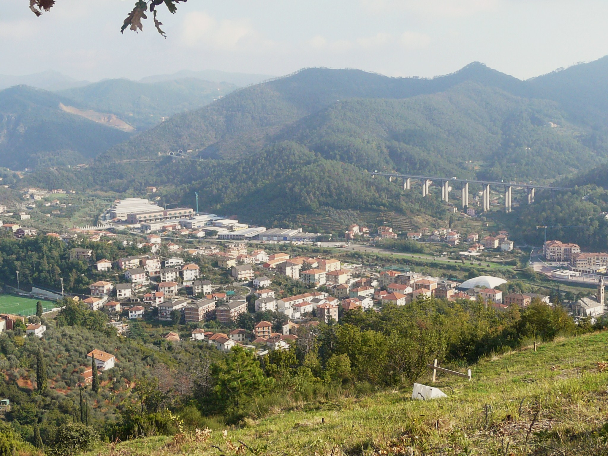 Panorama di Casarza Ligure, Liguria, Italia